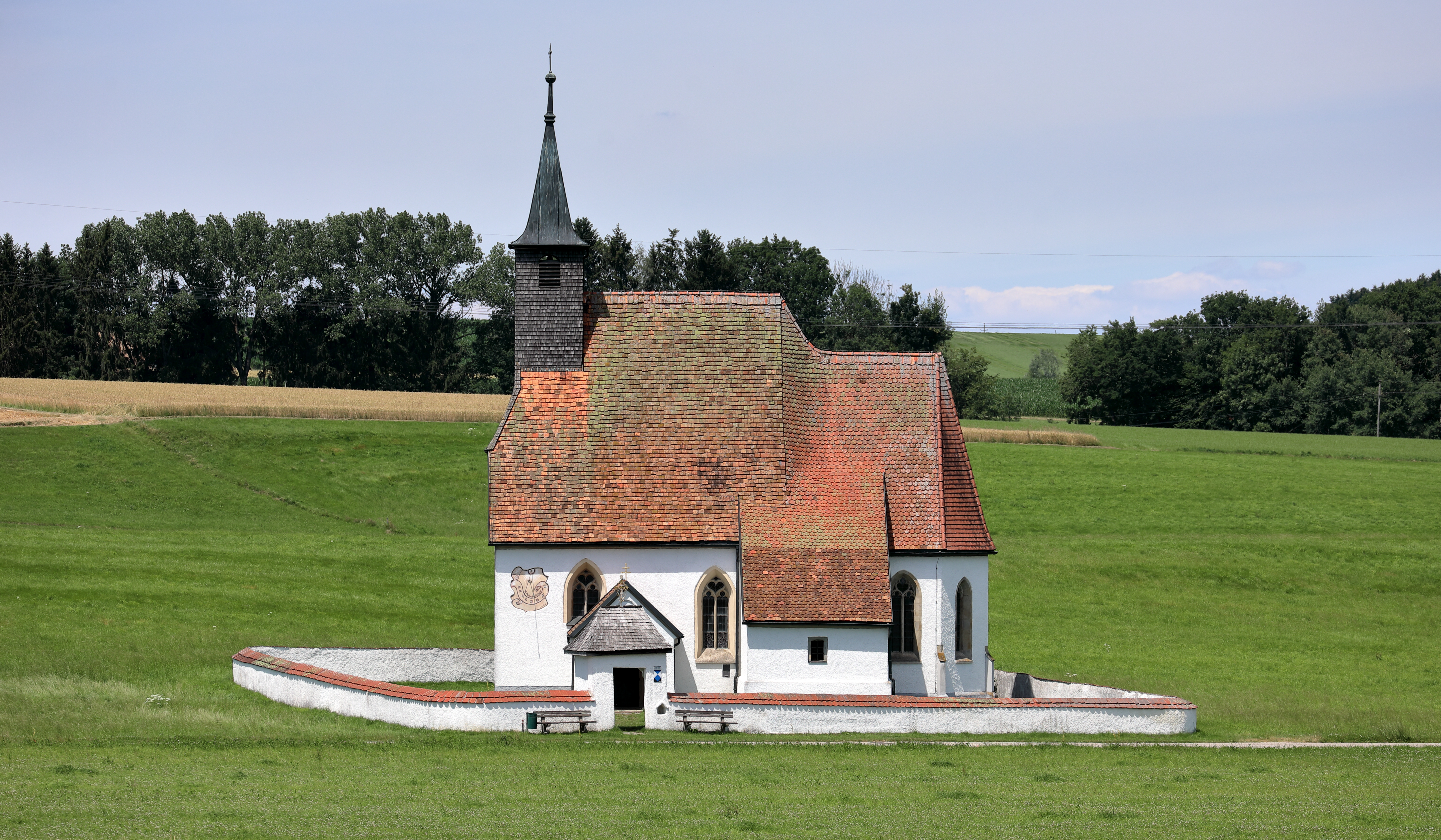 Südsüdostansicht der röm.-kath. Filialkirche hl. Michael in Kemating, ein Ortsteil der oberösterreichischen Marktgemeinde Seewalchen am Attersee. Eine kleine spätgotische Landkirche, die von einer Mauer mit Torbau umgeben ist.